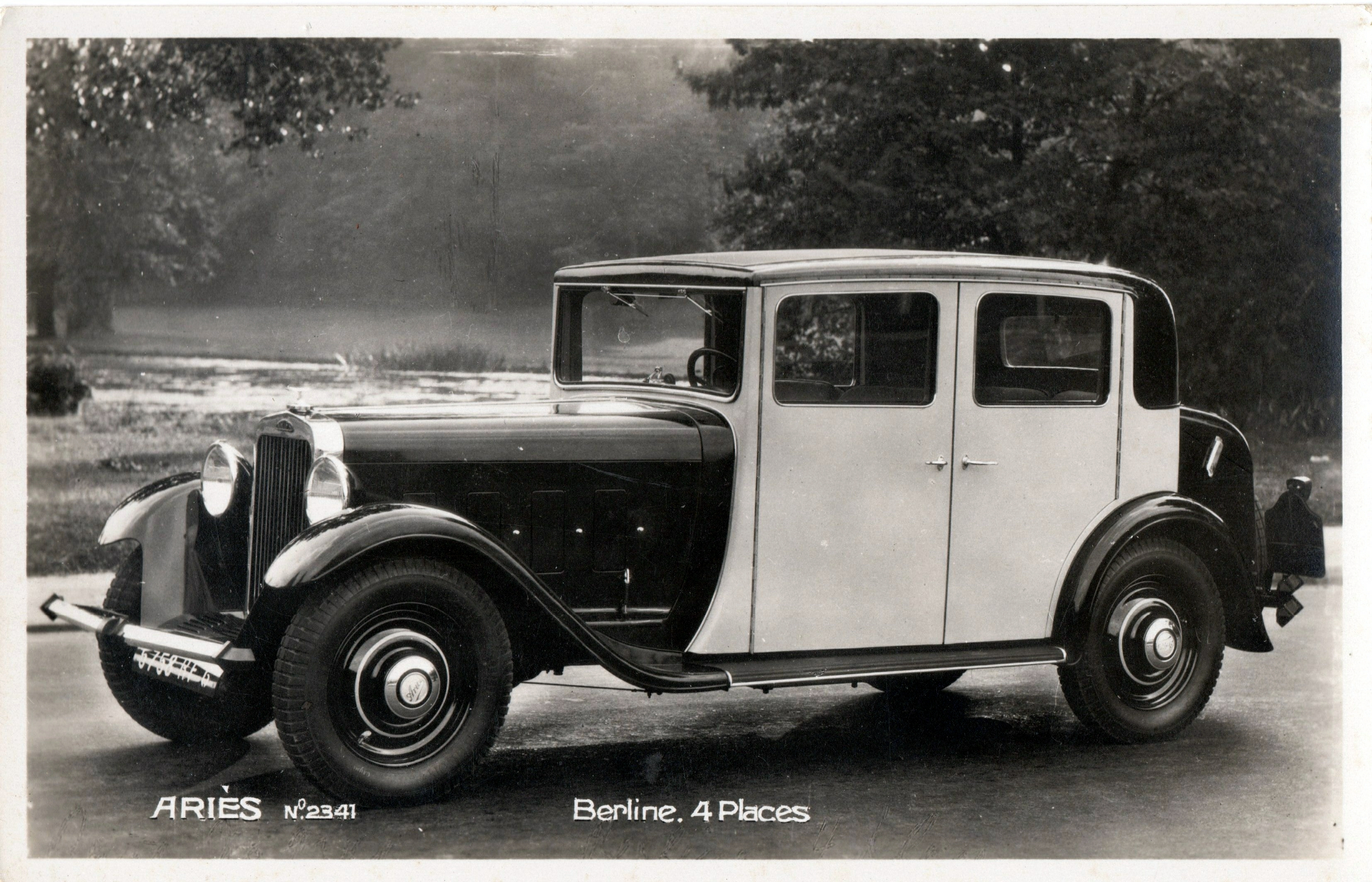 Aries Berline, 4 Places, 1932 (France)